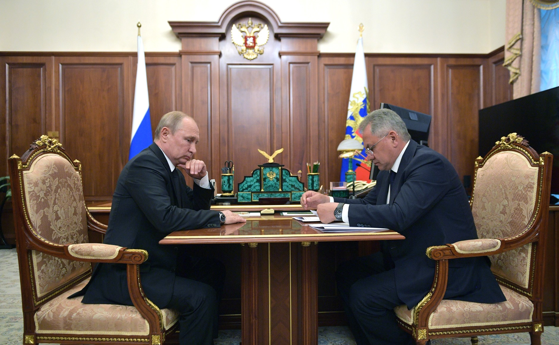 Встреча Владимира Путина с Министром обороны Сергеем Шойгу. Глава Минобороны доложил Верховному Главнокомандующему о пожаре на научно-исследовательском глубоководном аппарате Северного флота в Баренцевом море, в результате которого погибли 14 моряков-подводников.